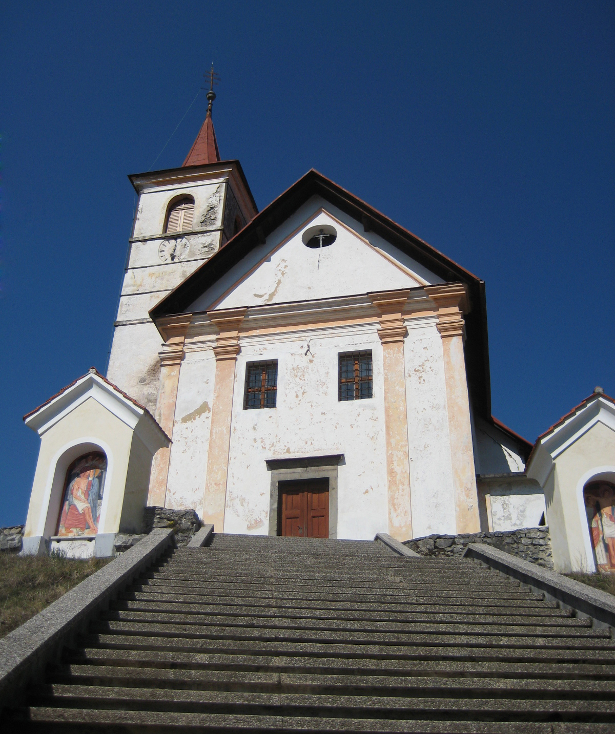 St. Mohor, church near Moravče, Slovenia